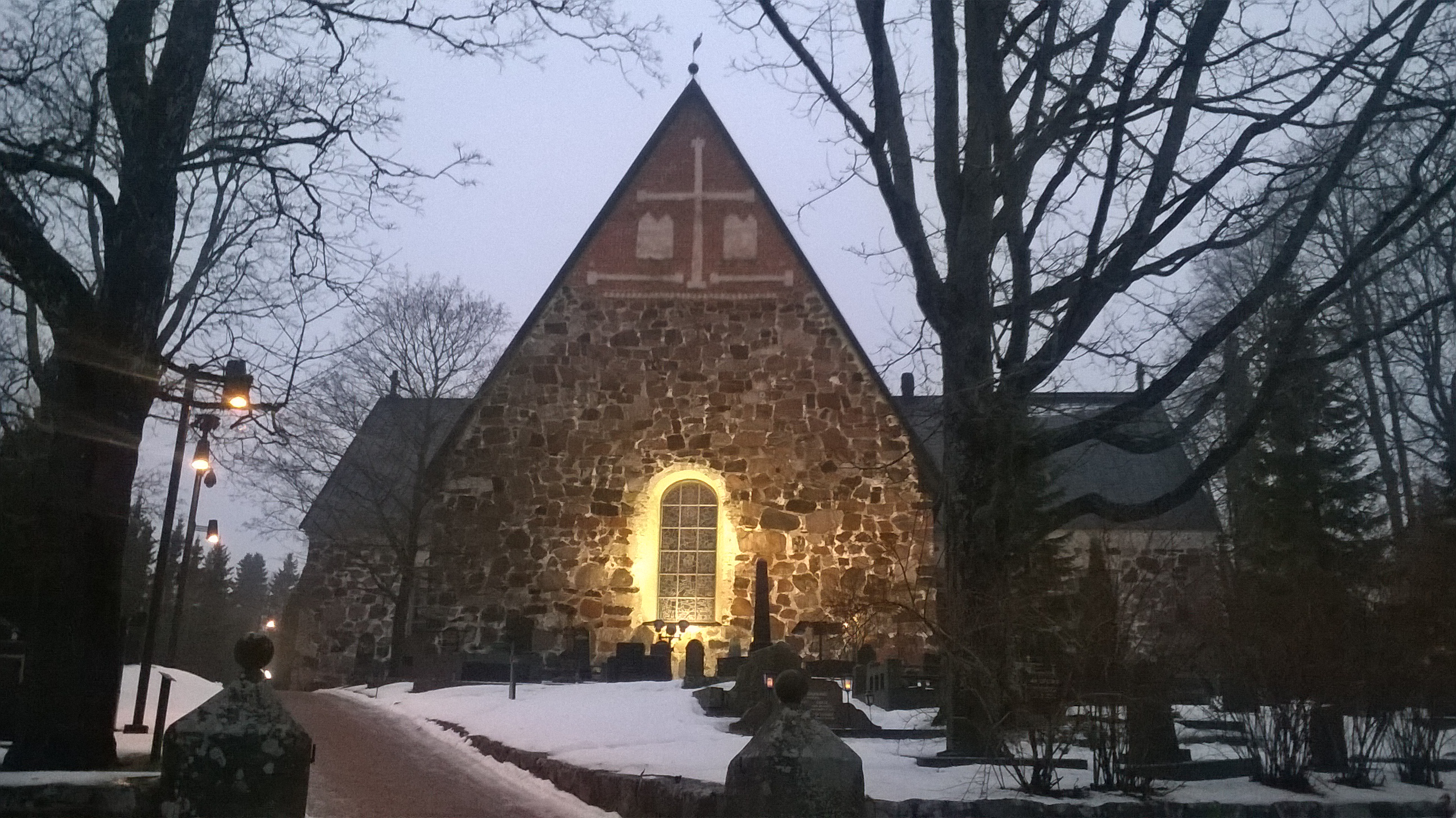 Espoon tuomiokirkko; church in Espoo, Finland